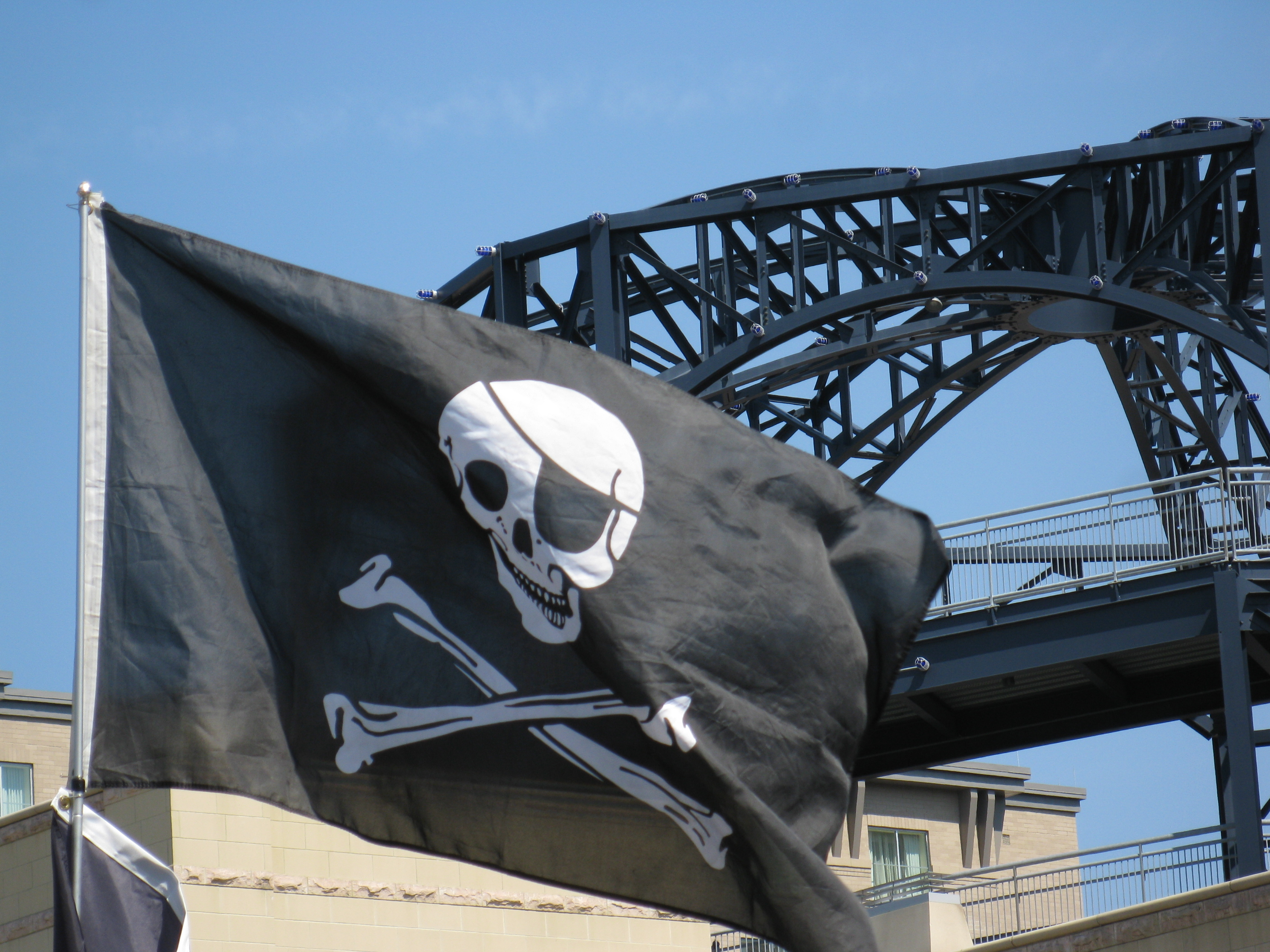 Pirate skull flag